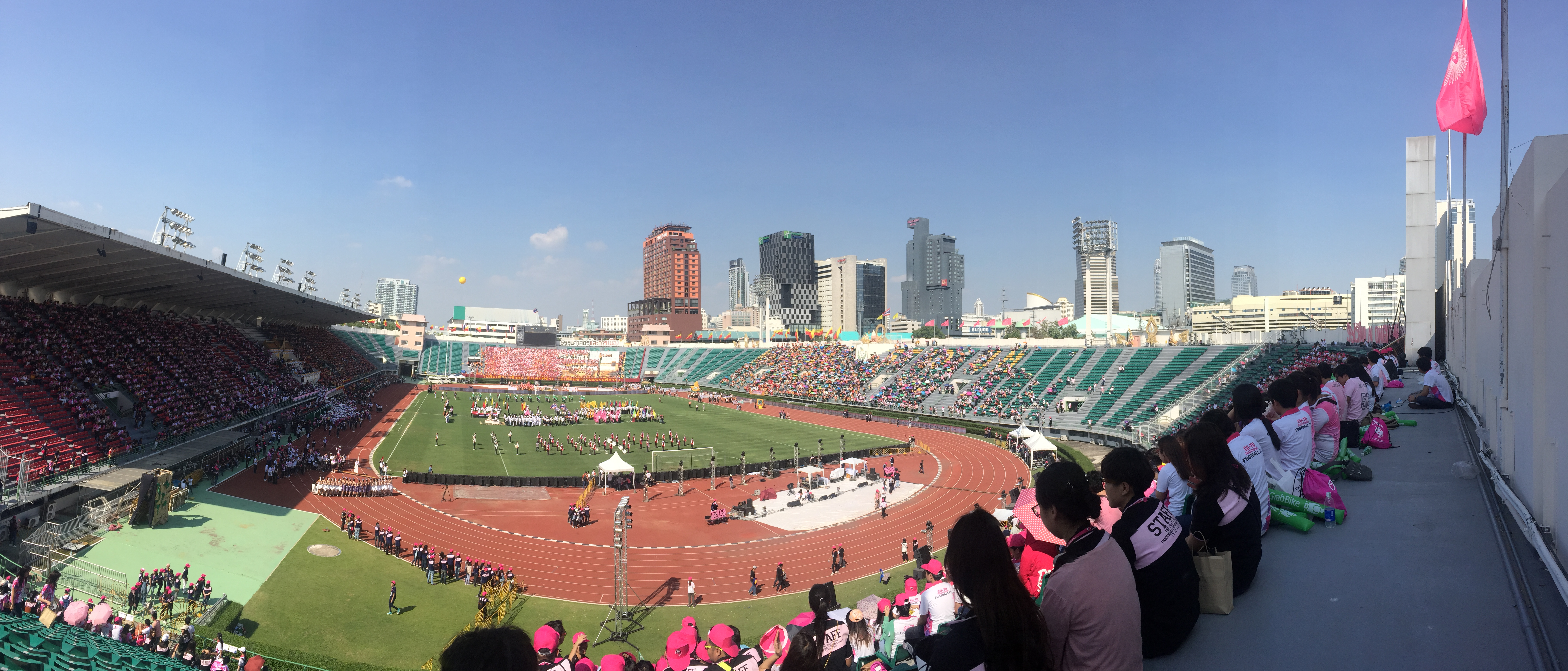 พิธีเปิดงานฟุตบอลประเพณีธรรมศาสตร์-จุฬาฯ ครั้งที่ 71